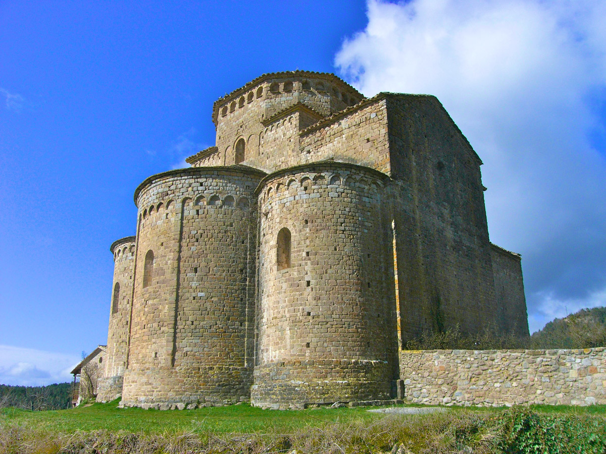 Sant Jaume de Frontanyà des del nord-est